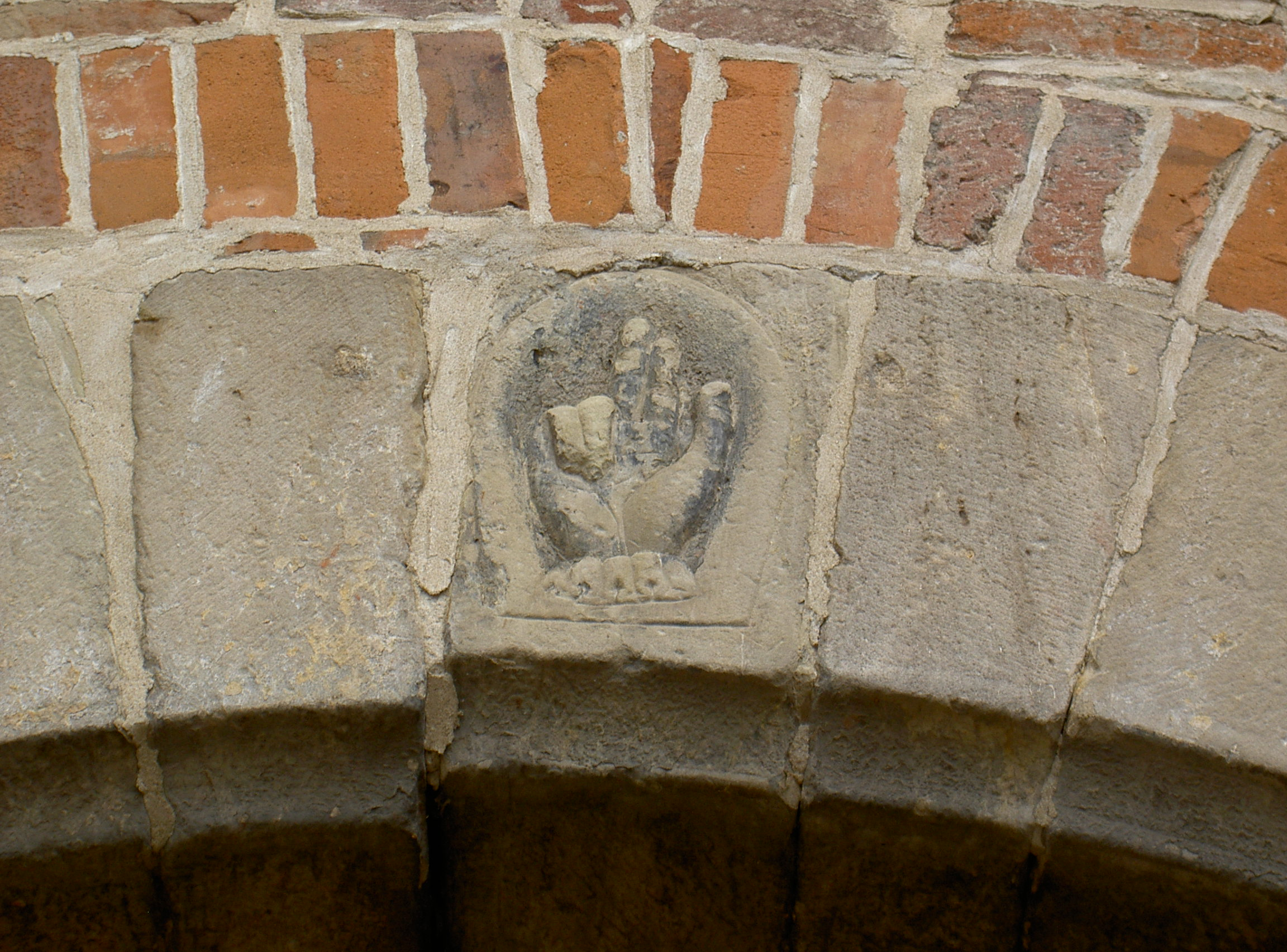 Die Rosenburg in Klein Rosenburg